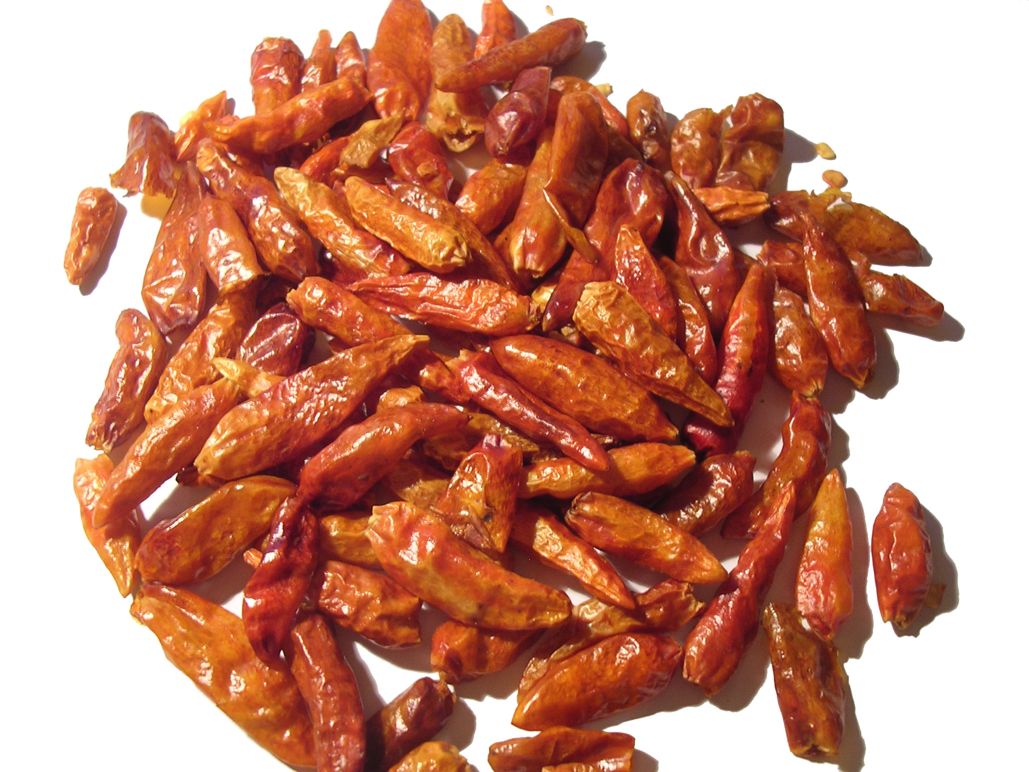 graines de pili-pili séchées